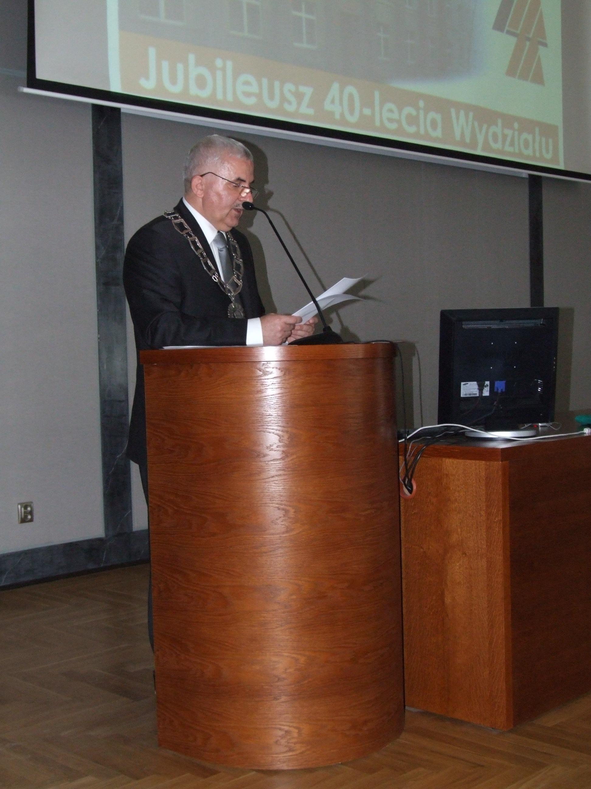 Prof. Wojciech Szkliniarz - Politechnika Śląska (Wydział Inżynierii Materiałowej i Metalurgii), podczas uroczystości 40-lecia Wydziału